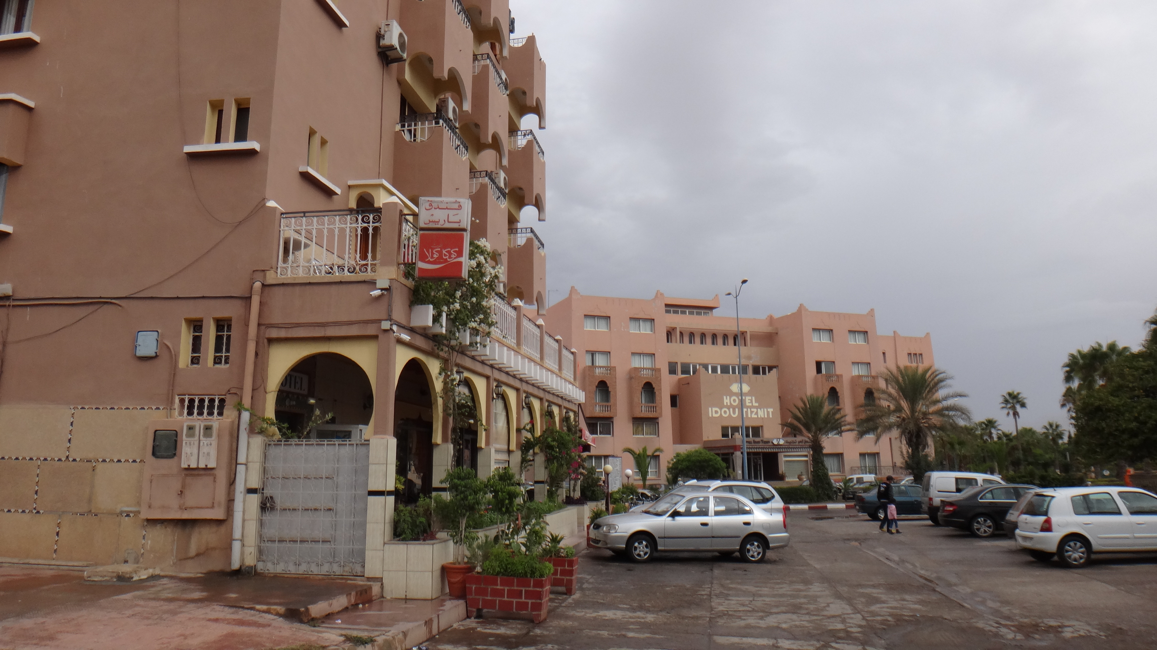 Tiznit 85000, Morocco